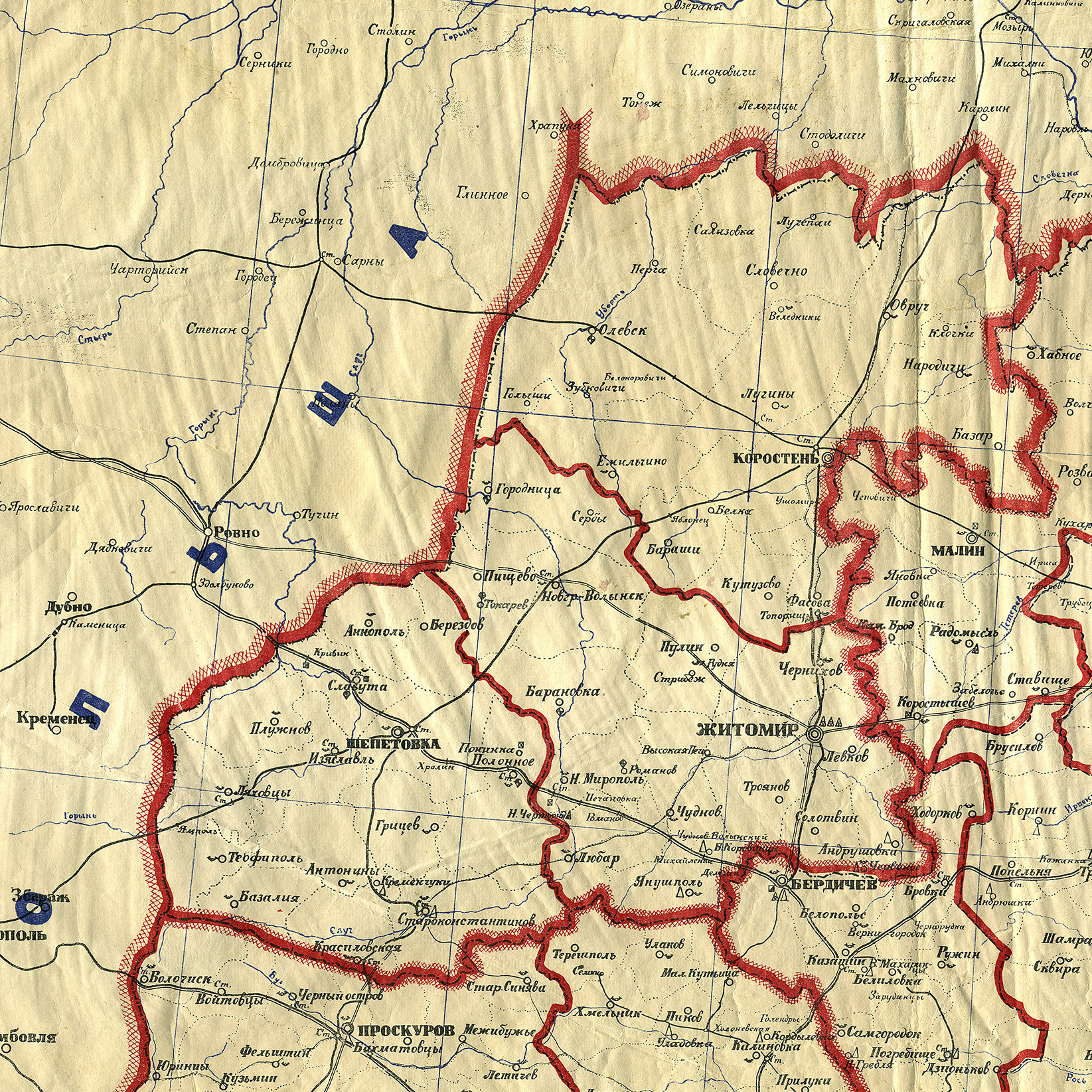 Волинська губернія, фрагмент мапи Української соц. рад. республіки, адміністративний поділ після 12 квітня 1923 року